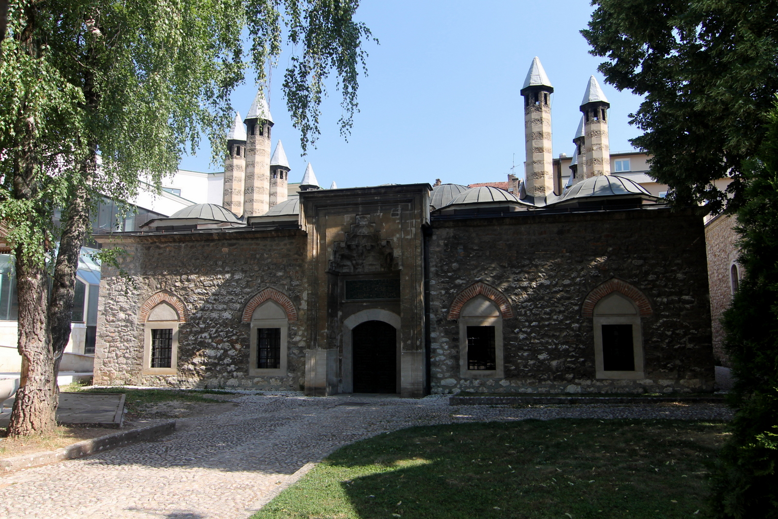 IMG_5552Bosznia_Szarajevo